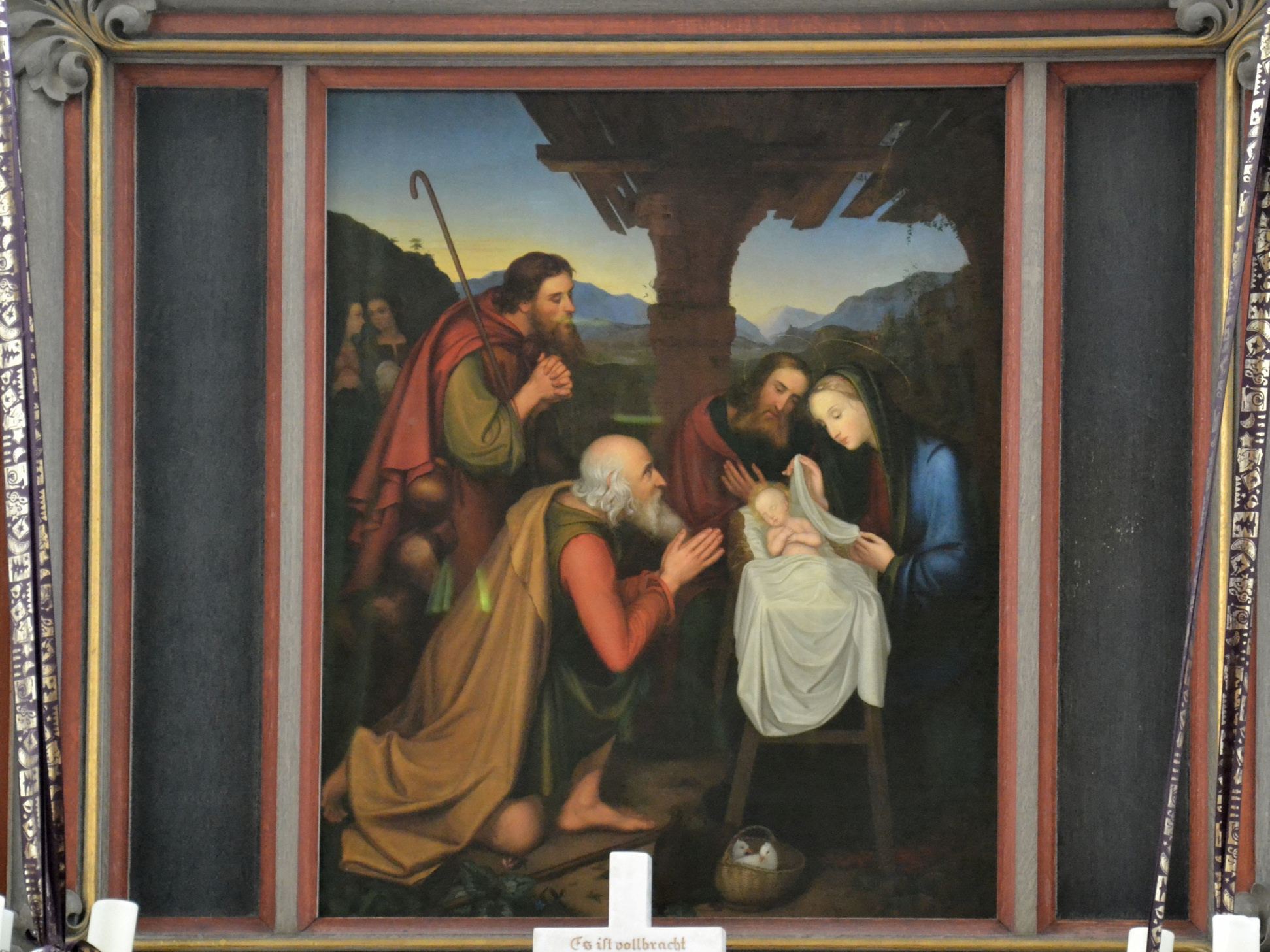 Original des Künstlers in der Friedenskirche zu Essen-Steele